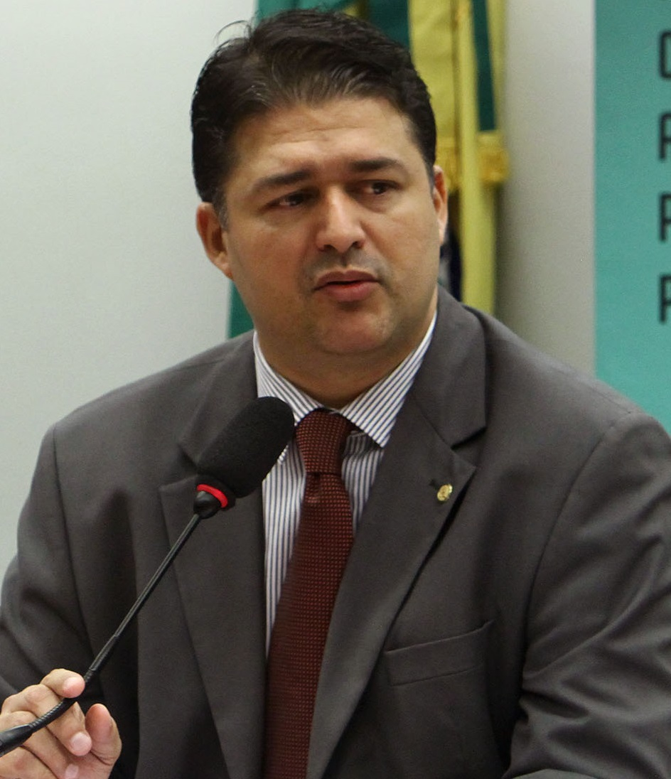 Roberto Sales em novembro de 2017.